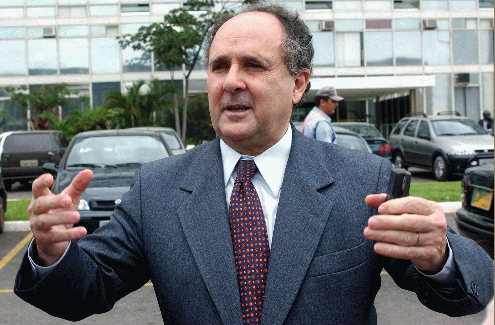 Brasília - O ministro da Educação, Cristovam Buarque, dá entrevista depois do almoço oficial com a rainha Silvia, da Suécia. (Foto: José Cruz - ABr - hor.12)